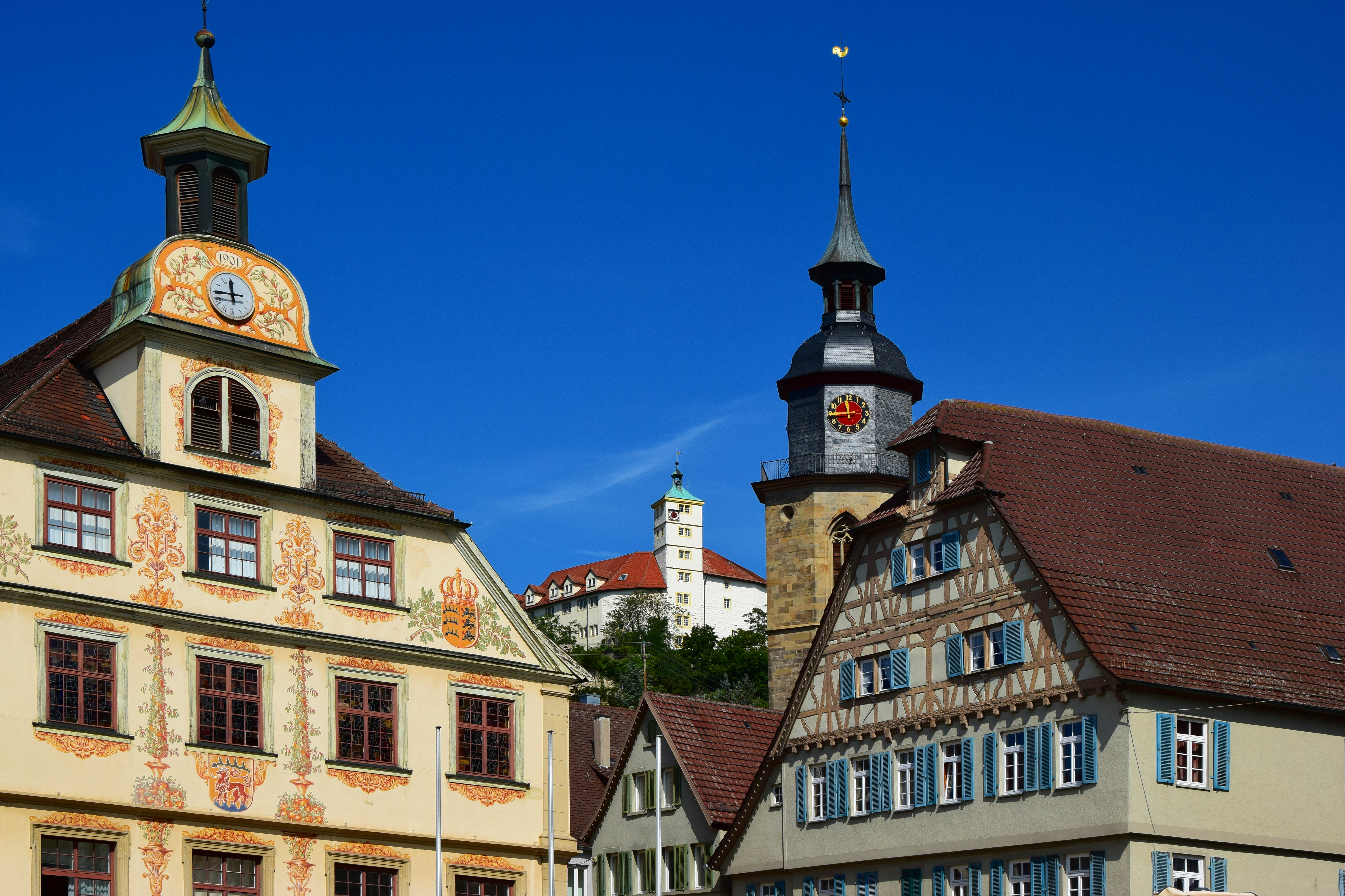 Türme des Rathauses, der evangelischen Stadtkirche und von Schloss Kaltental in Vaihingen an der Enz, Landkreis Ludwigsburg, Deutschland. See also Wikipedia article: de :Vaihingen an der Enz, en :Vaihingen an der Enz, fr :Vaihingen-sur-l'Enz, it :Vaihingen an der Enz, ru :Файинген-ан-дер-Энц, nl :Vaihingen an der Enz, pl :Vaihingen an der Enz, zh :恩茨河畔法伊欣根, pt :Vaihingen and ar :فايهينغن. Wikidata has entry Q61928 with data related to this item.